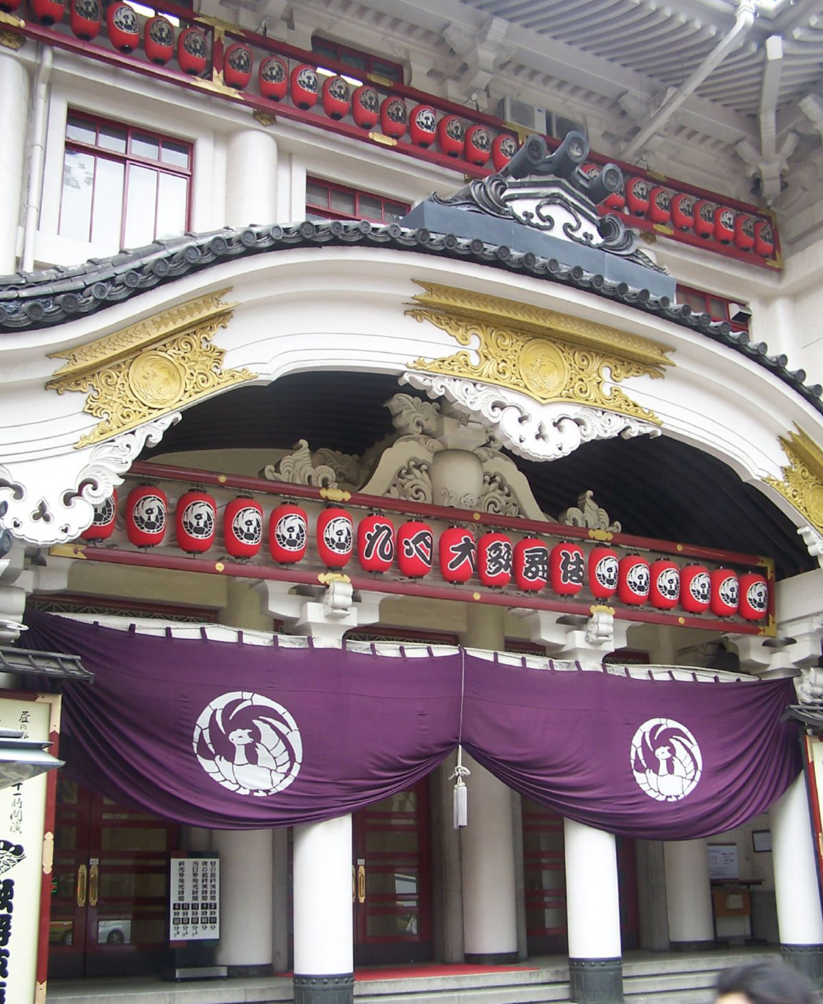 Kabuki-za, a kabuki theatre in Tokyo